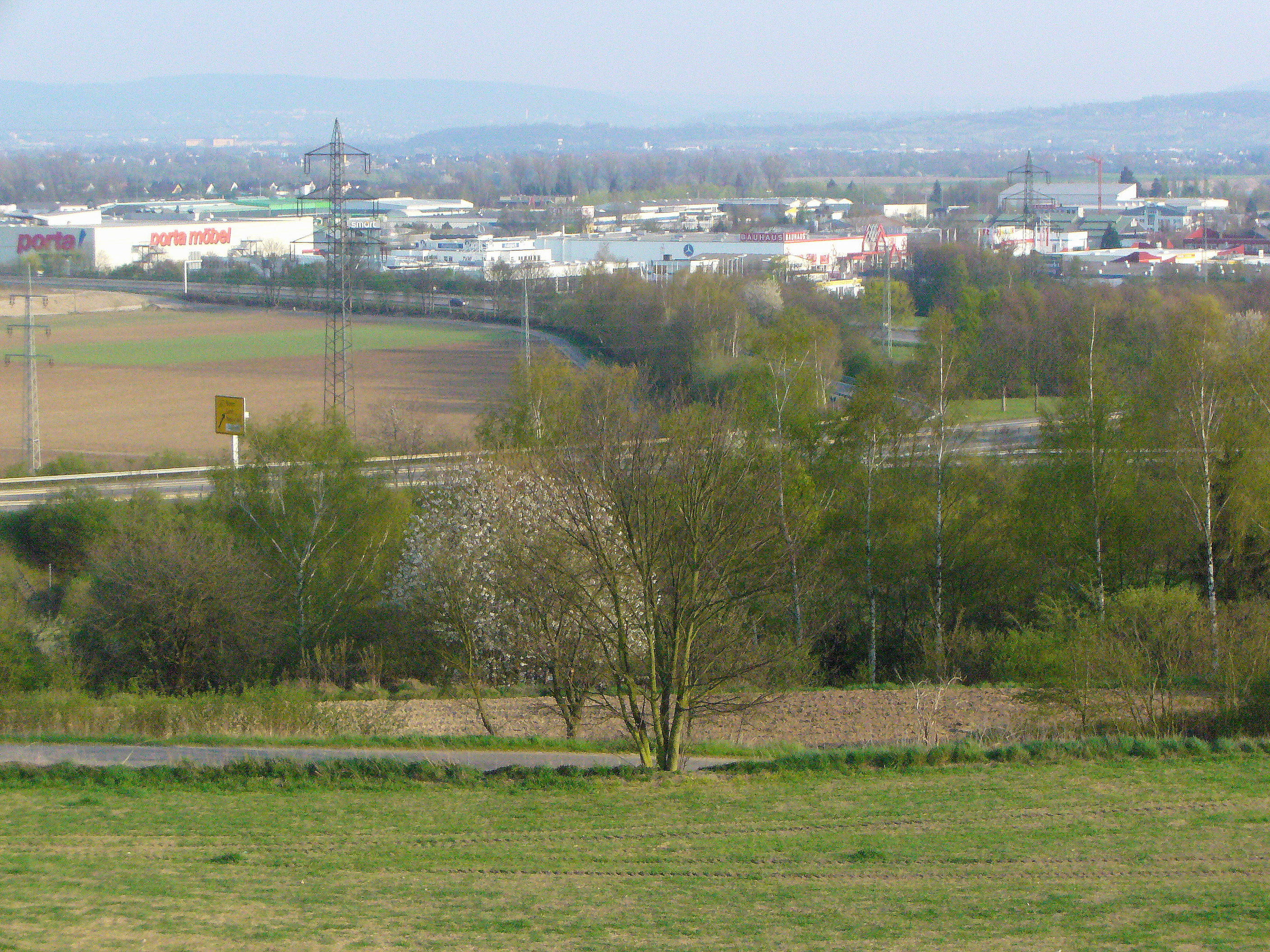 Gewerbegebiet in Neuwied, Überblick